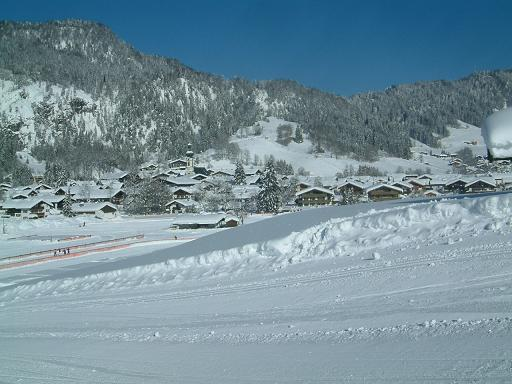 Reit im Winkler Ortskern